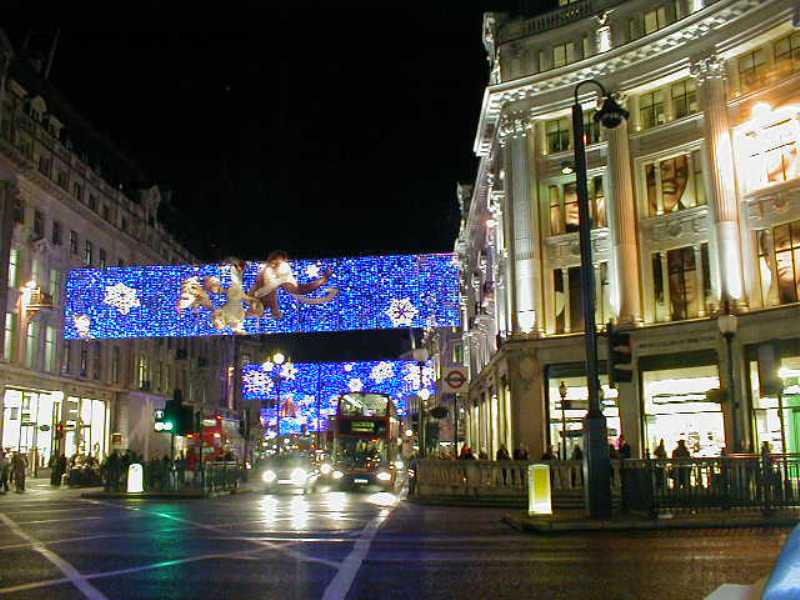 Luces navideñas en Oxford Circus en 2005